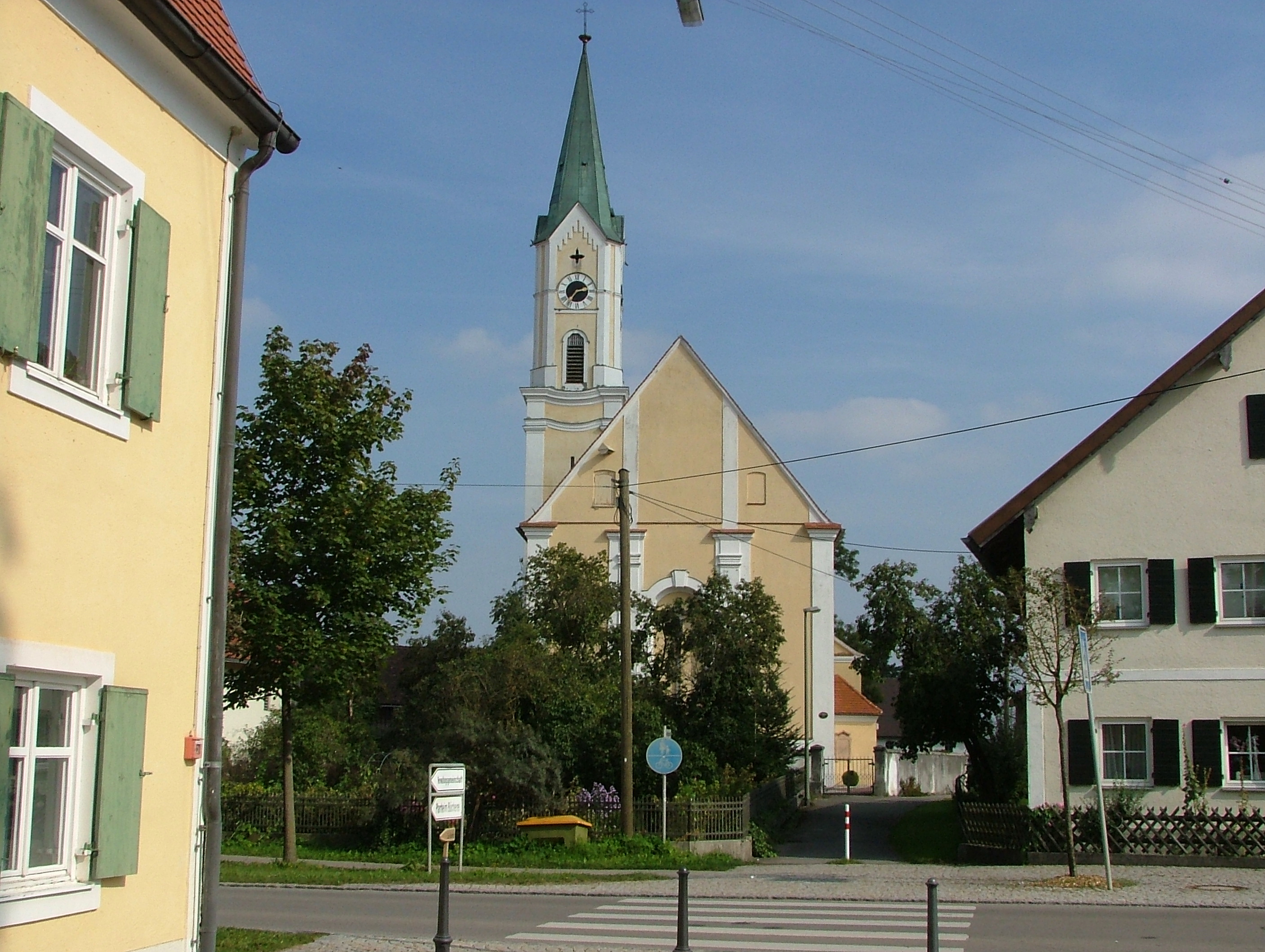 St.Johannes